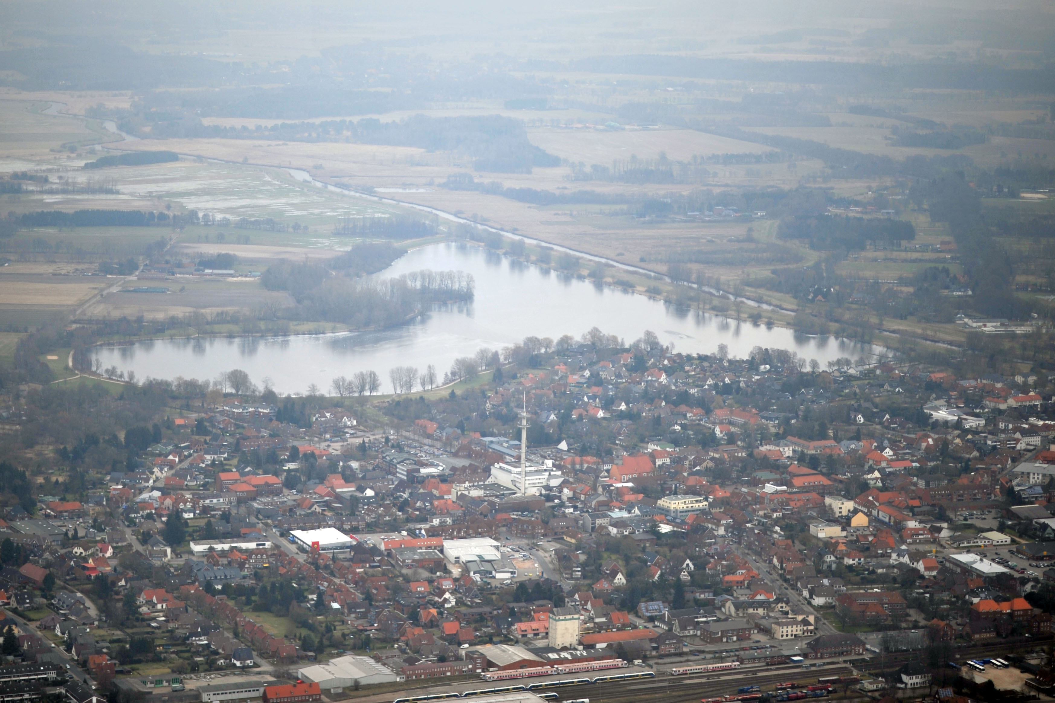 Fotoflugkurs Cuxhaven 2013: Bremervörde von SW